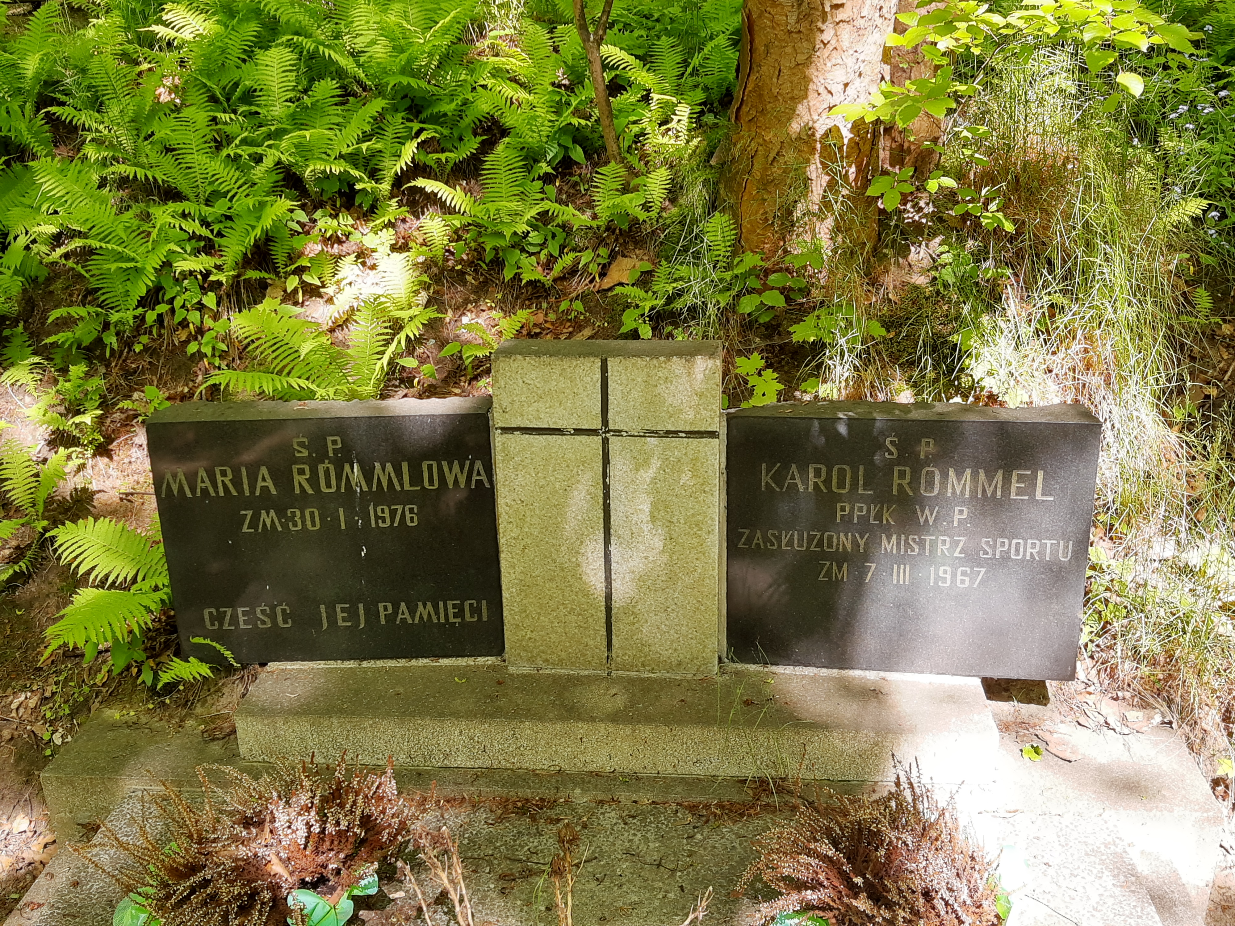 Grób Karola Rómmla na cmentarzu Srebrzysko